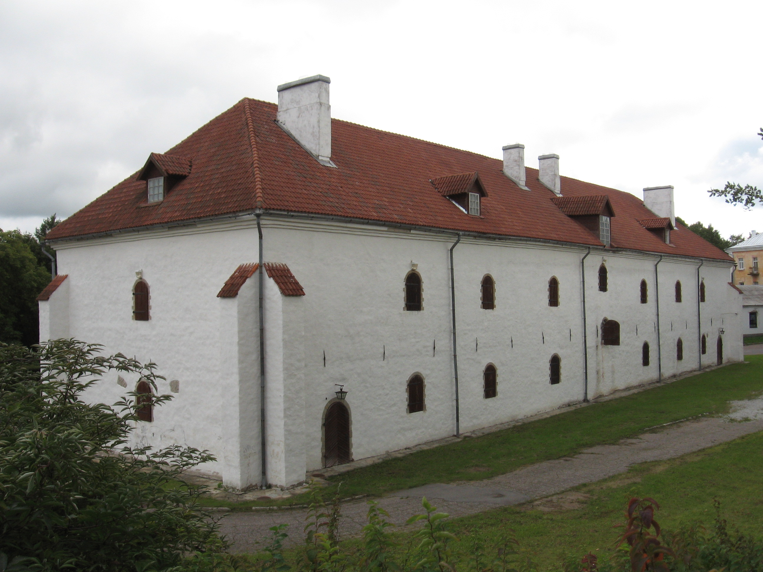 Magasiait Narvas